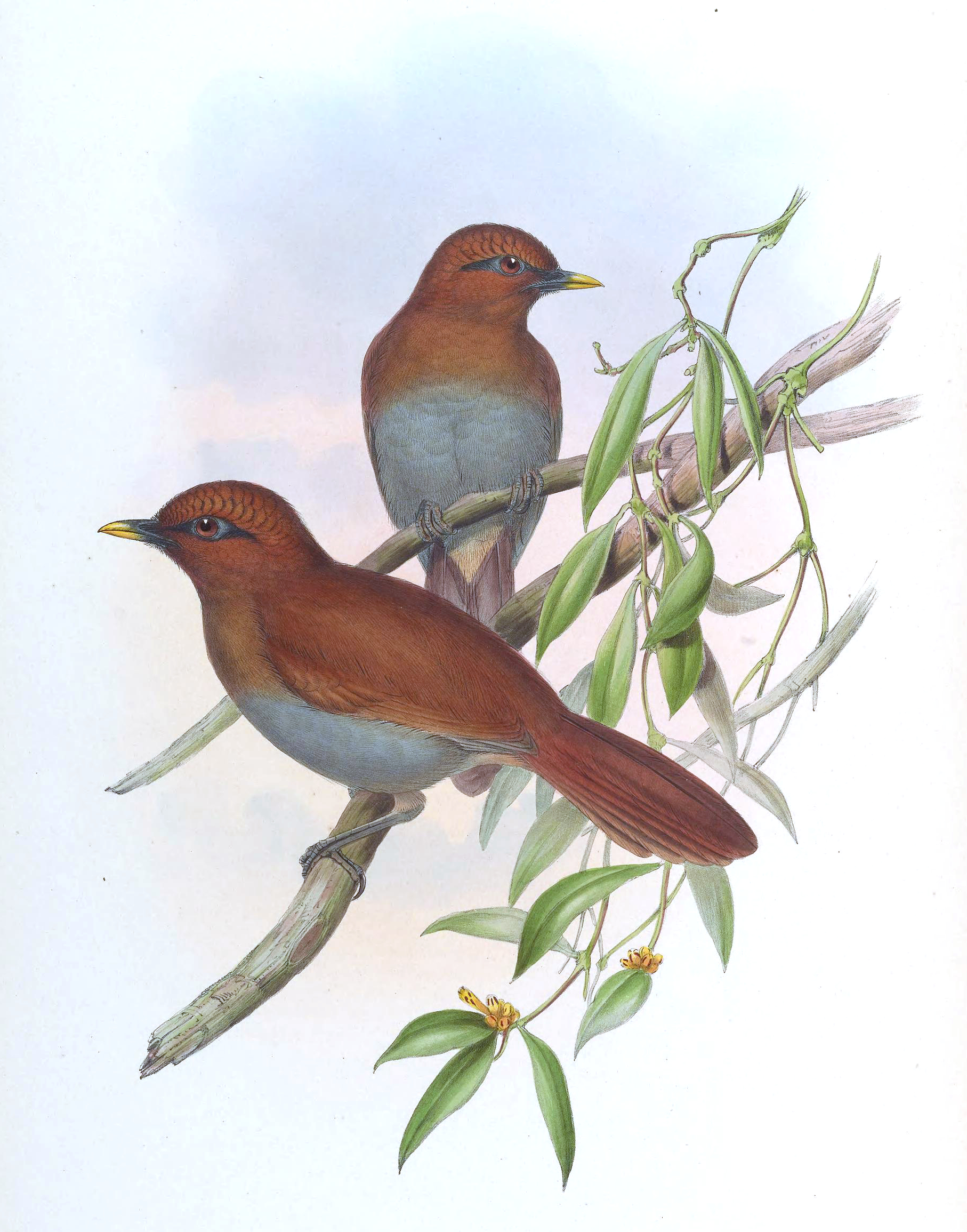 Garrulax poecilorhyncha